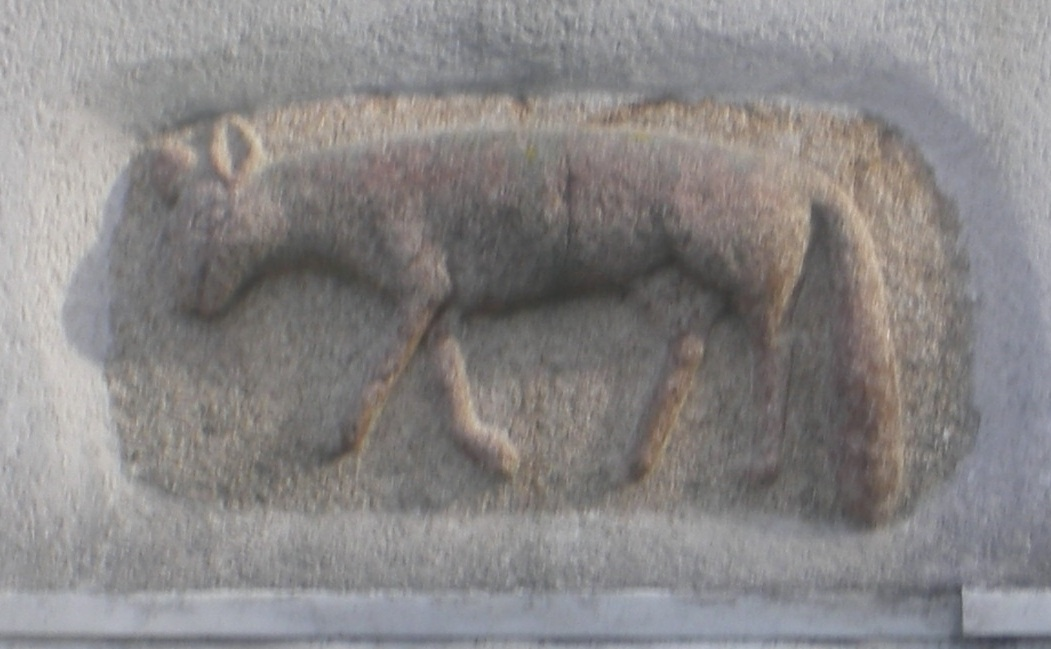 * Date : 13 août 2006 Source : photo personnelle d'archeos Description : Renard en bas-relief sur une façade de la place du Renard, à Mortagne-sur-Sèvre